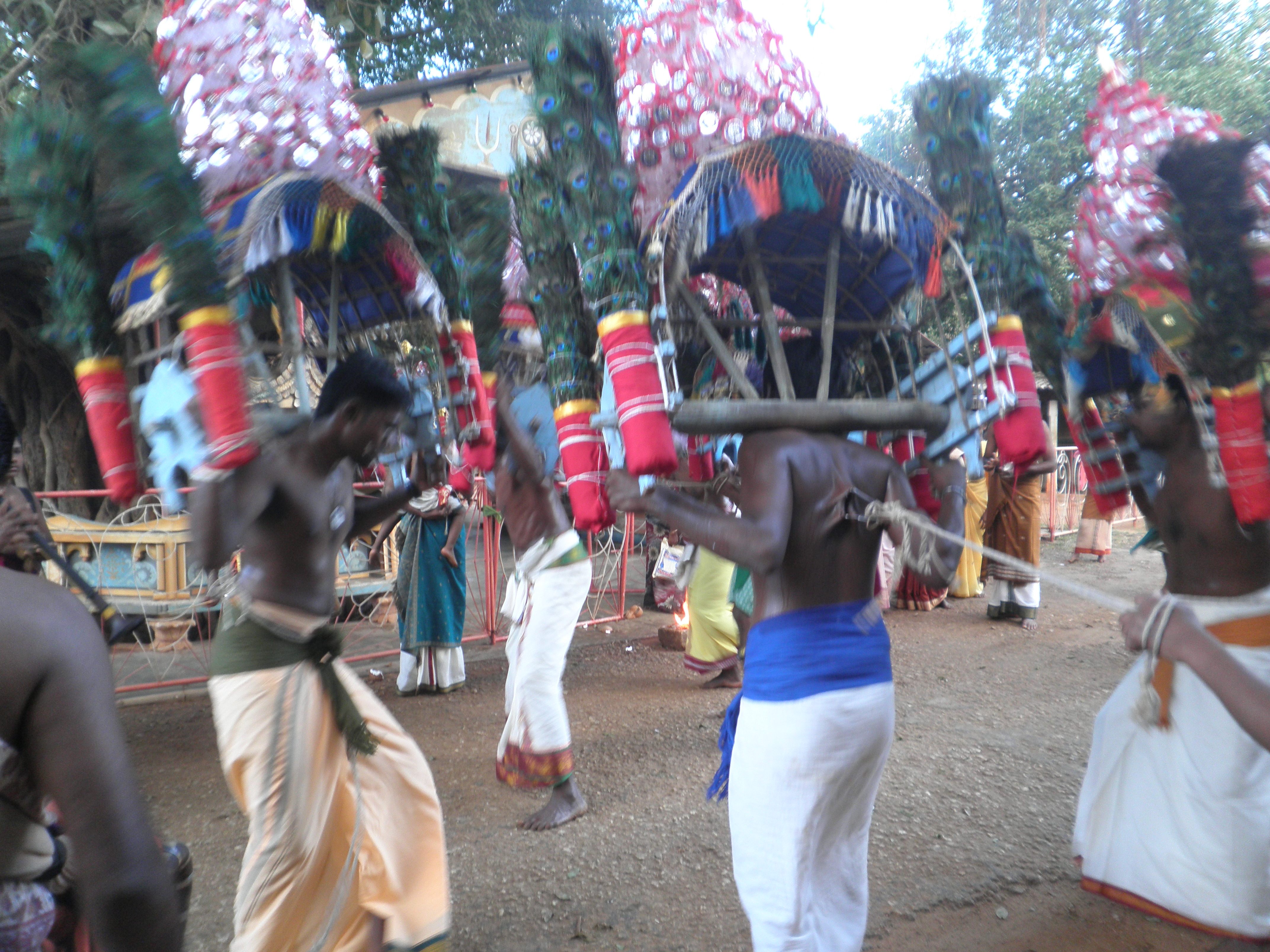 நேர்த்திக்காகக் காவடி எடுப்போர் கோயிலுக்கு ஊர்வலமாகச் செல்லும் வழியில் உள்ள இன்னொரு கோயிலுக்கு முன் நின்று ஆடும் காட்சி.